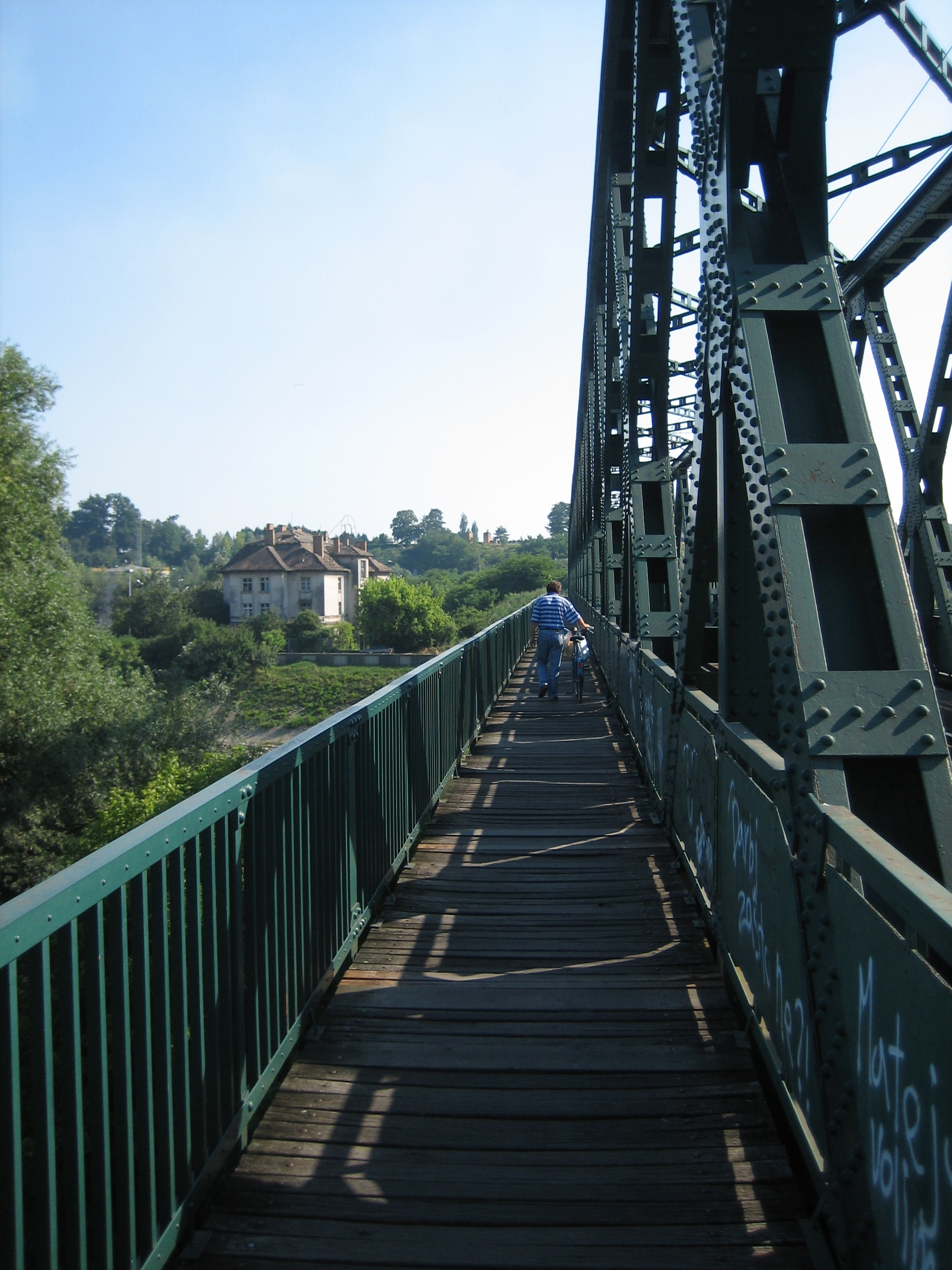 Railway bridge in Sisak, Croatia. / Željeznički most preko Kupe u Sisku.